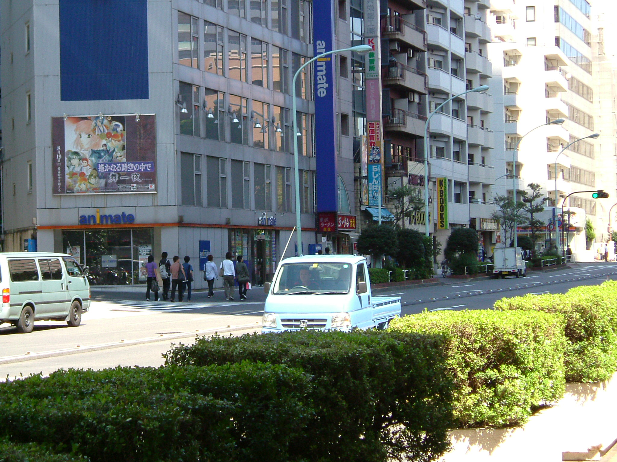 Otome Road in Ikebukuro, Tokyo, Japan